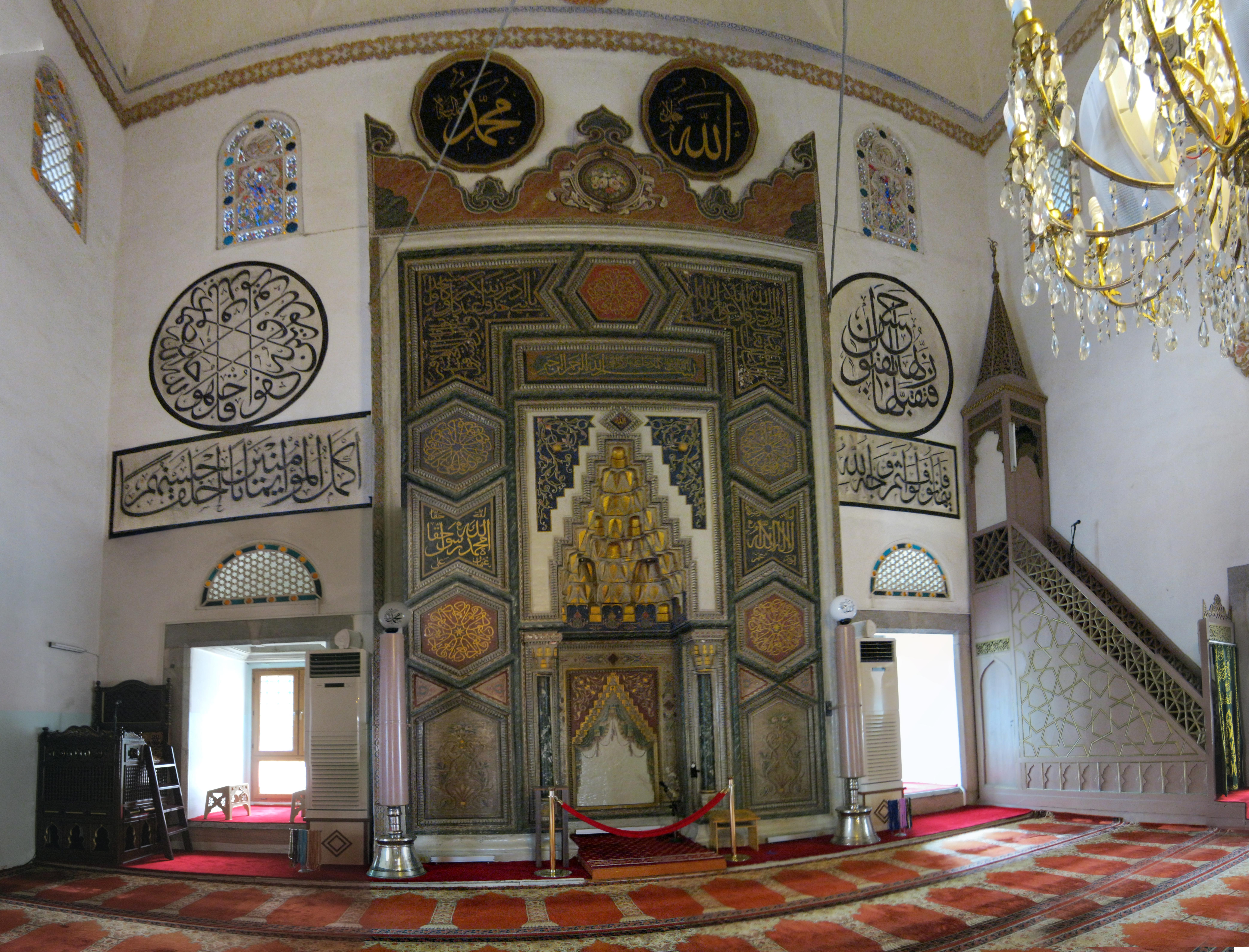 Yıldırım Bayezid Camii Bursa